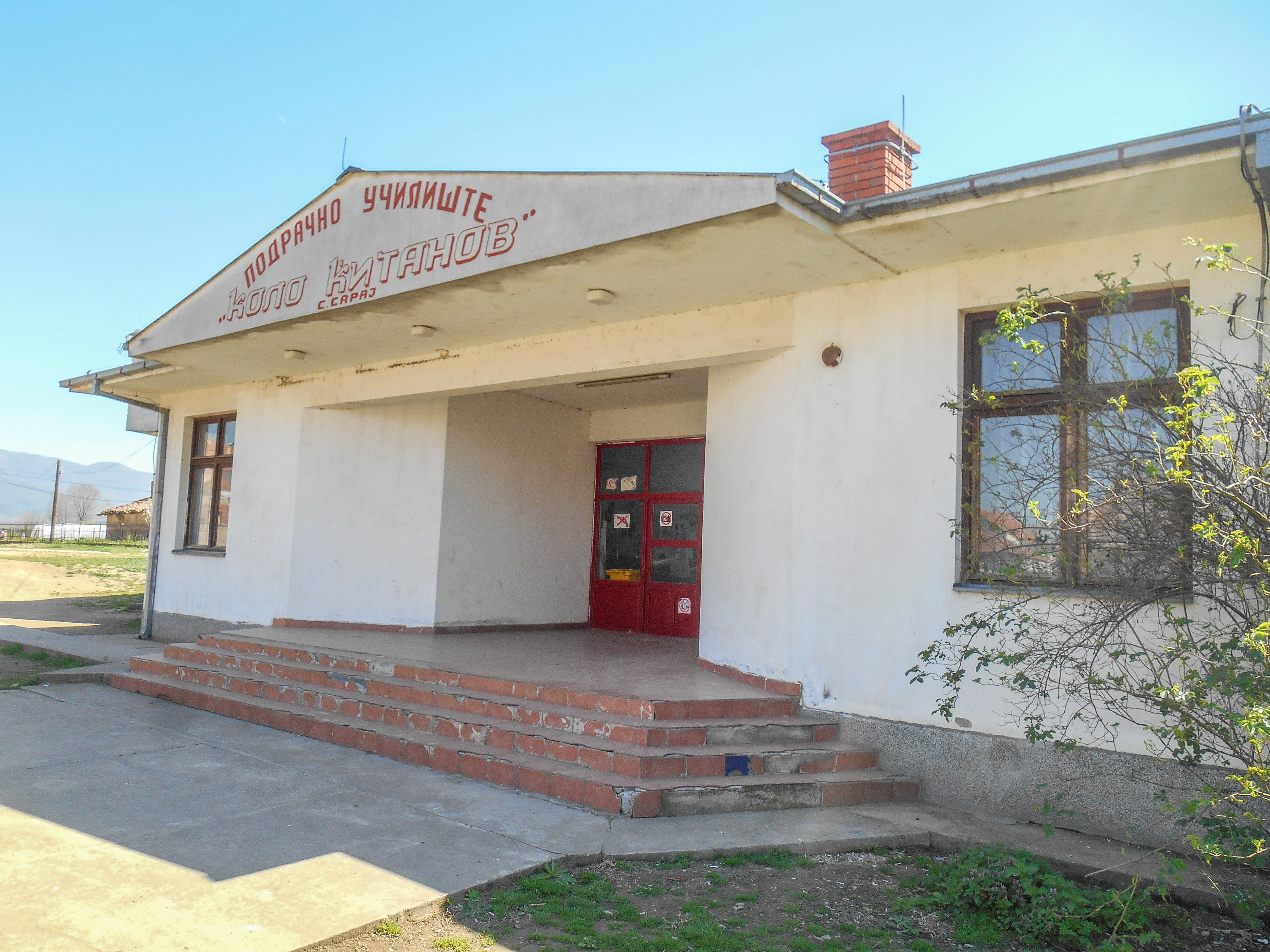 Основно училиште „Кољо Китанов“ - Сарај